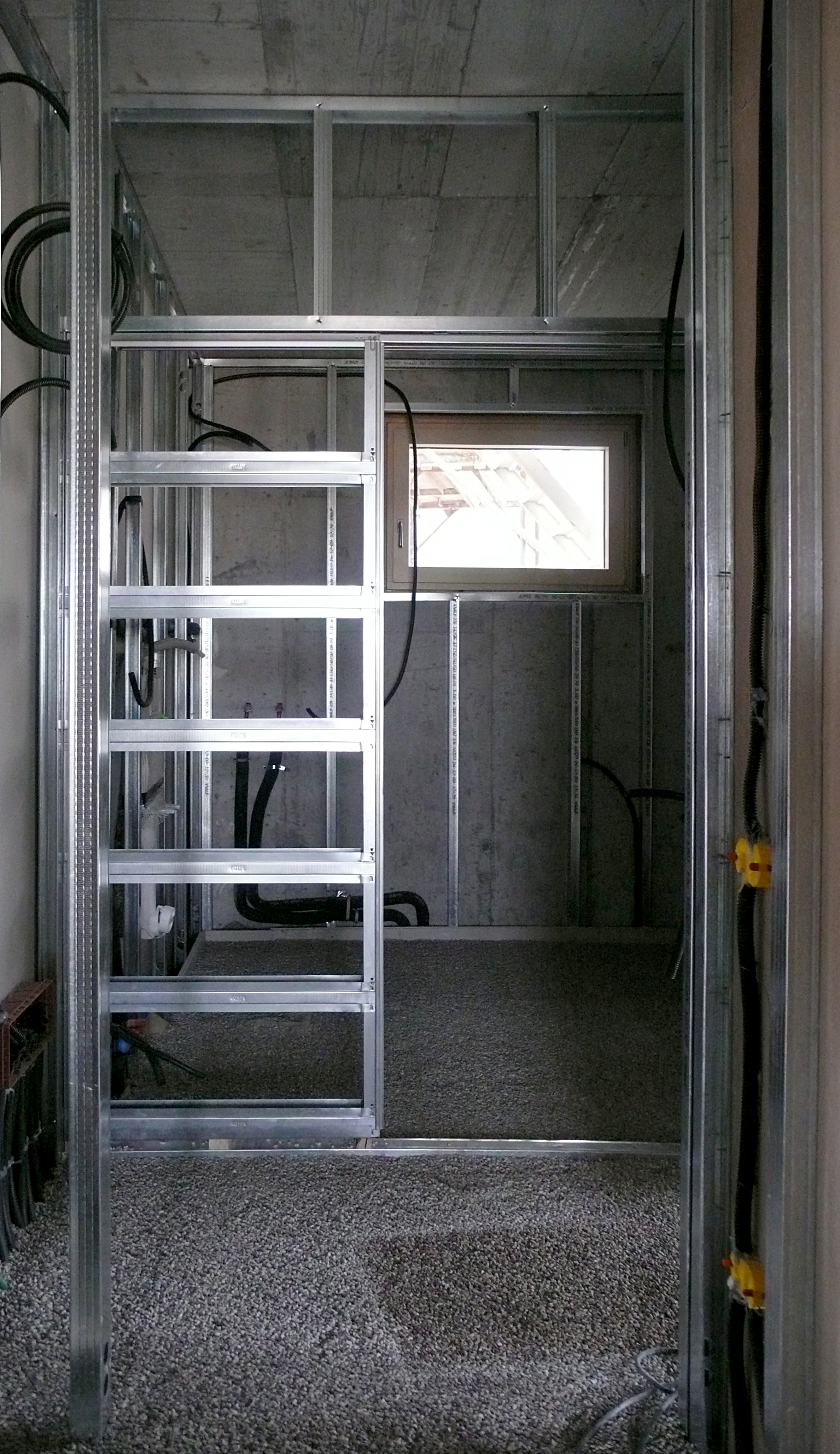 struttura di un controtelaio per porta scorrevole a scomparsa installato in pareti a secco (cartongesso).